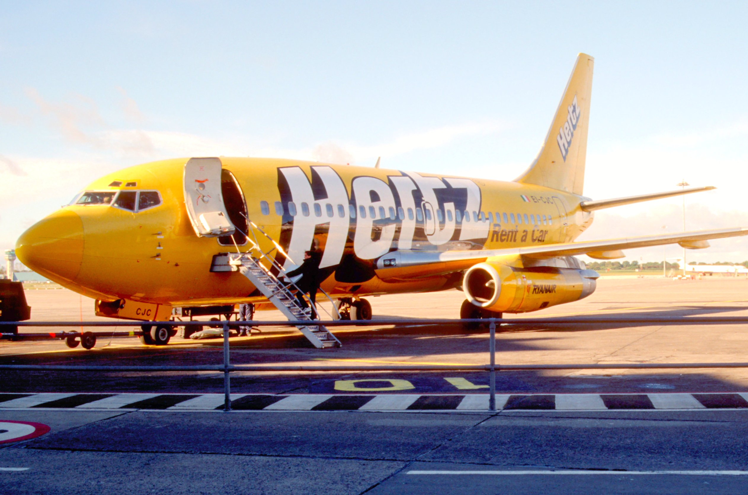 192ag - Ryanair Boeing 737-204; EI-CJC@DUB;23.10.2002